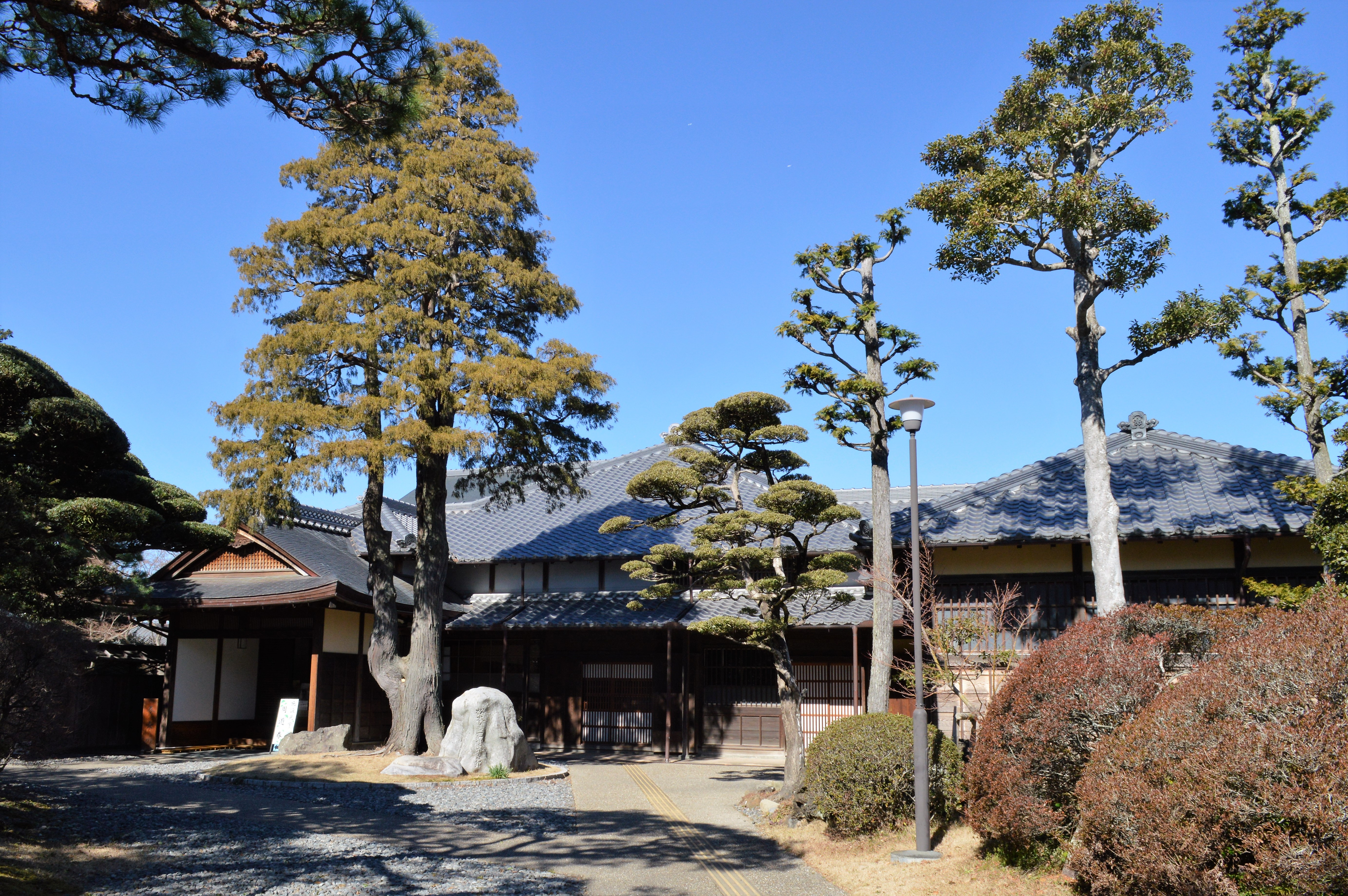 掛川城の郭「竹の丸」。